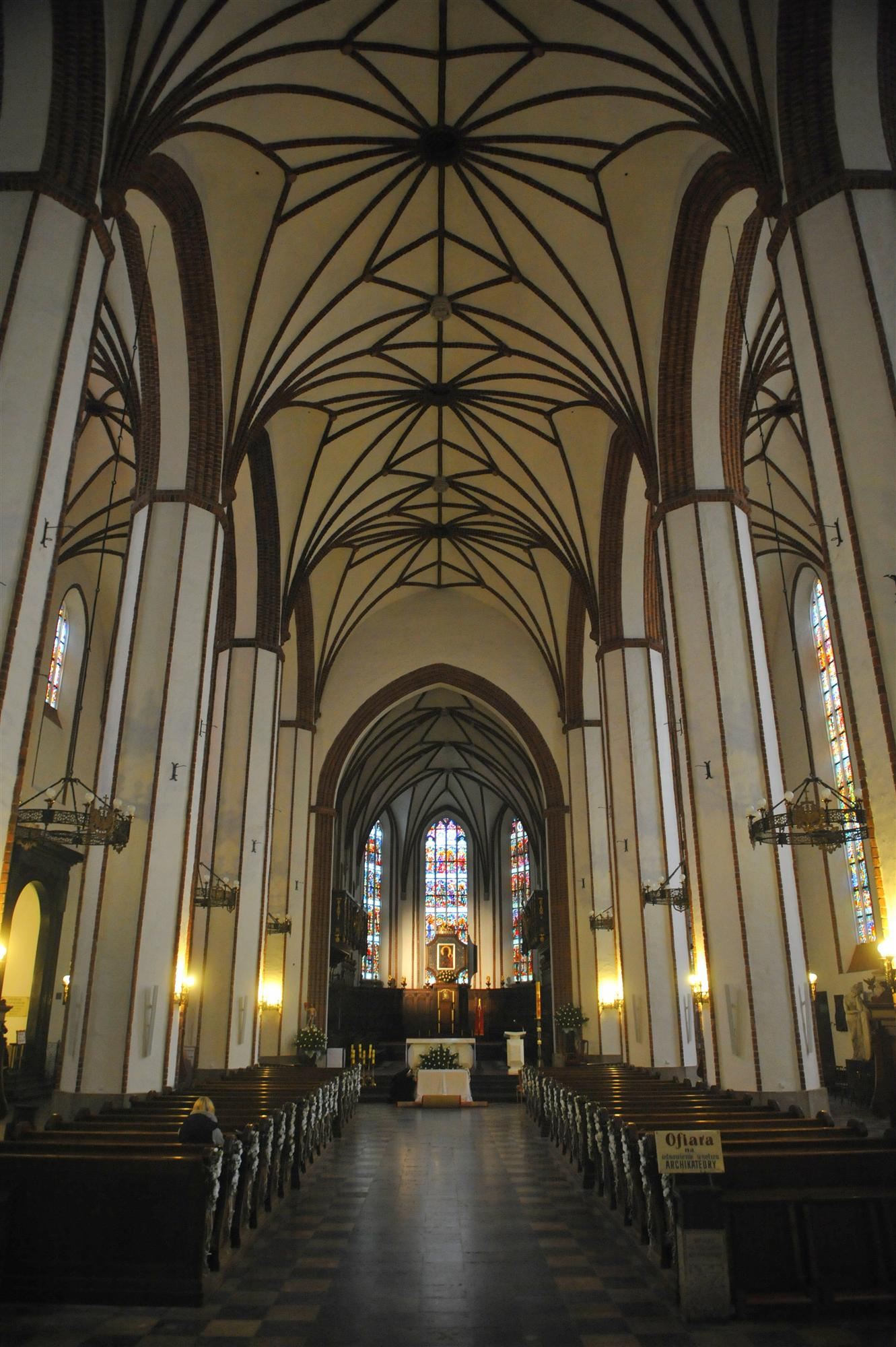 Wnętrze Bazyliki Archikatedralnej św. Jana Chrzciciela w Warszawie